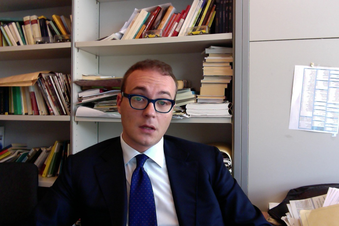 Il giornalista Tommaso Cerno